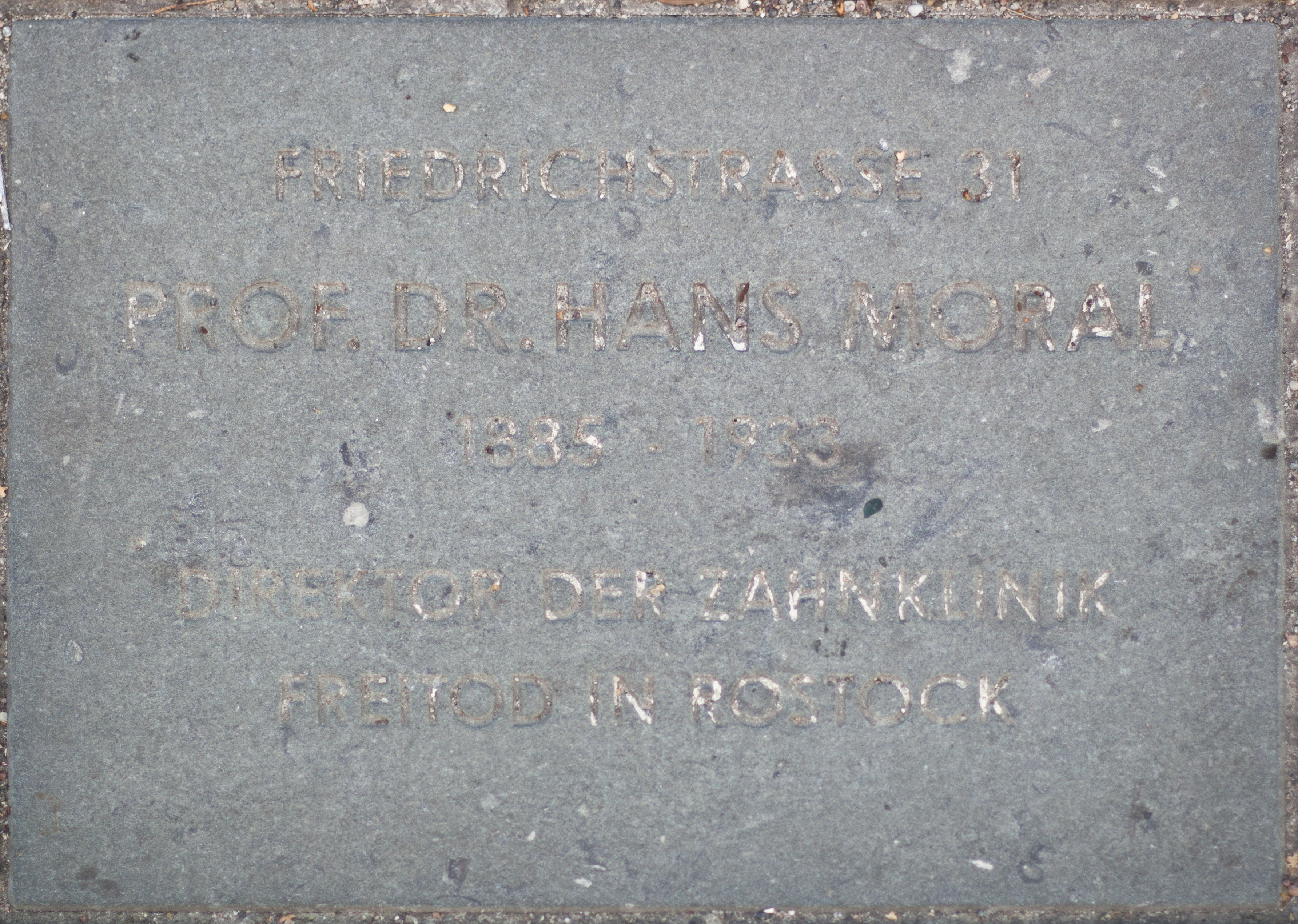 Denkstein in Rostock für Hans Moral